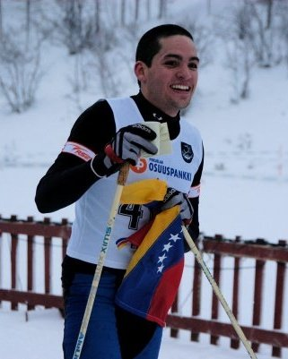 Cesar Baena